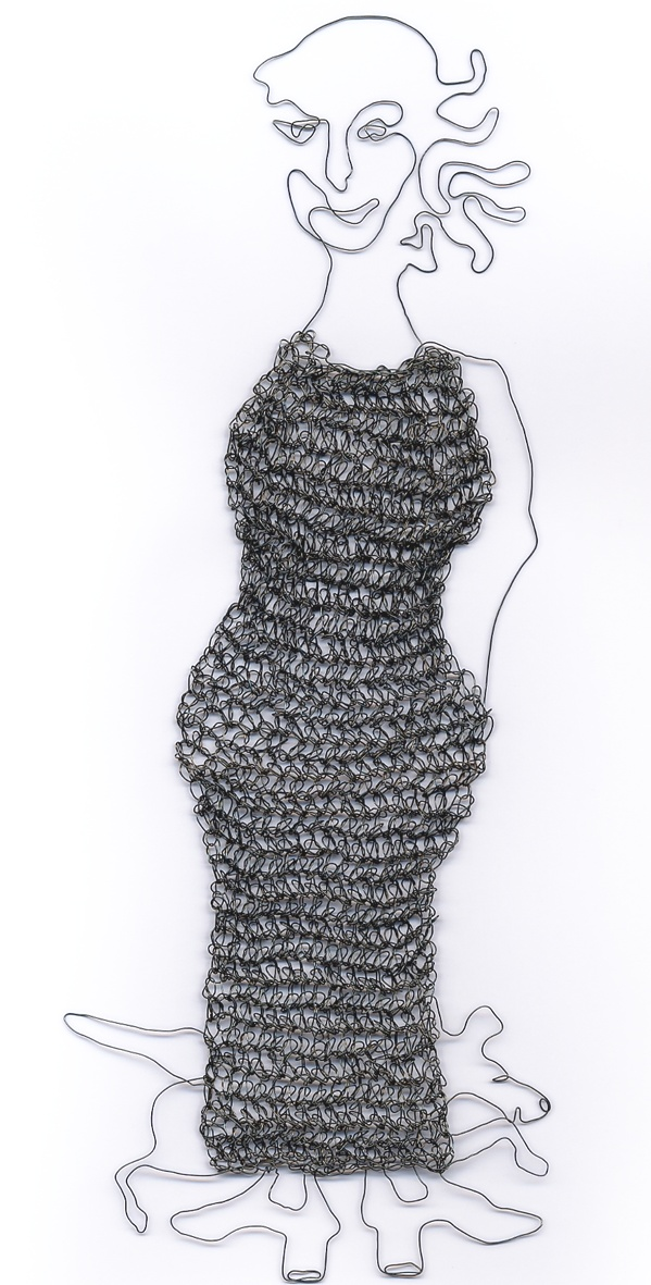 Foto einer Drahtfigur von Mechtild Böger